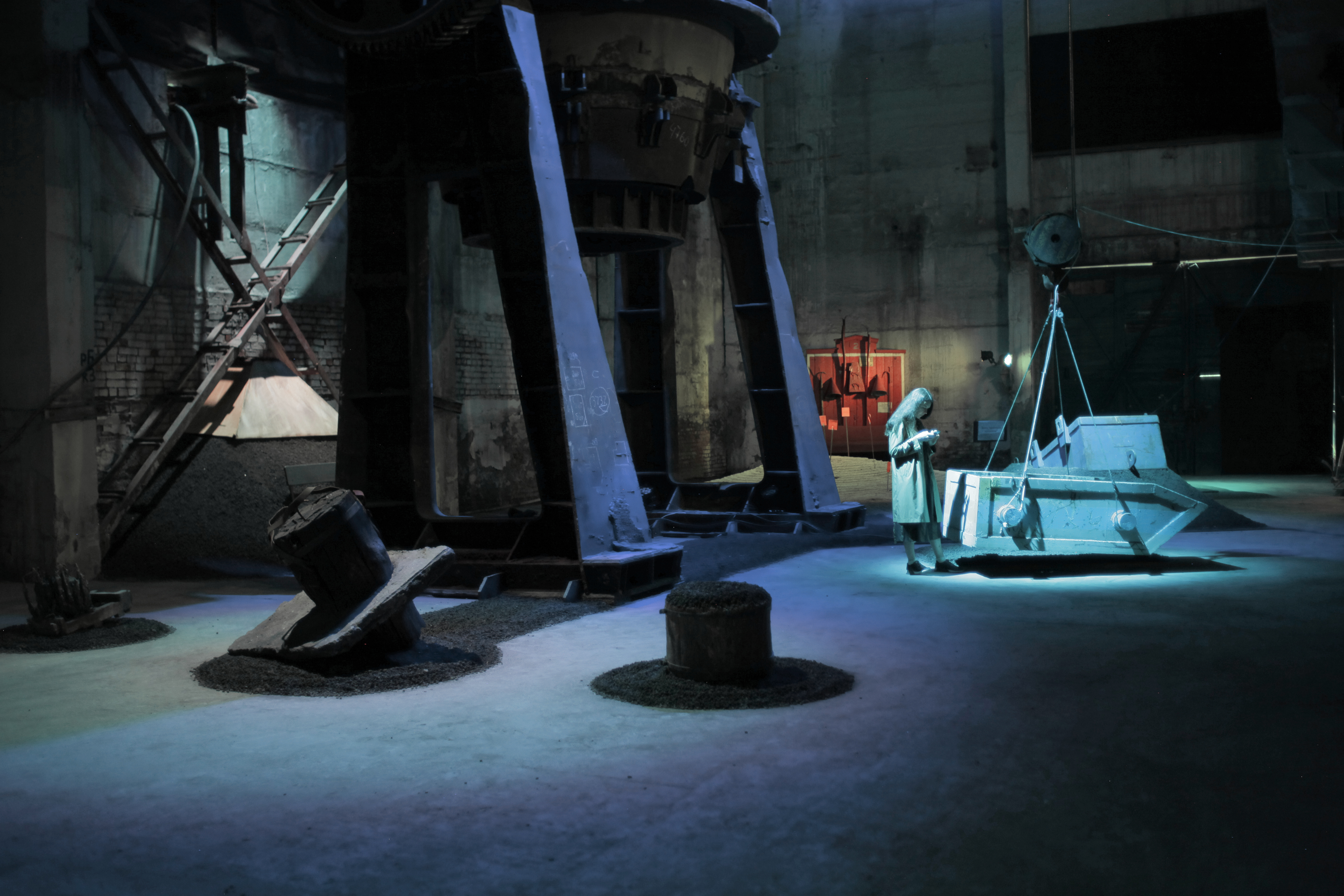 Вид постиндустриального парка, посвященному виду с Лисьей горы